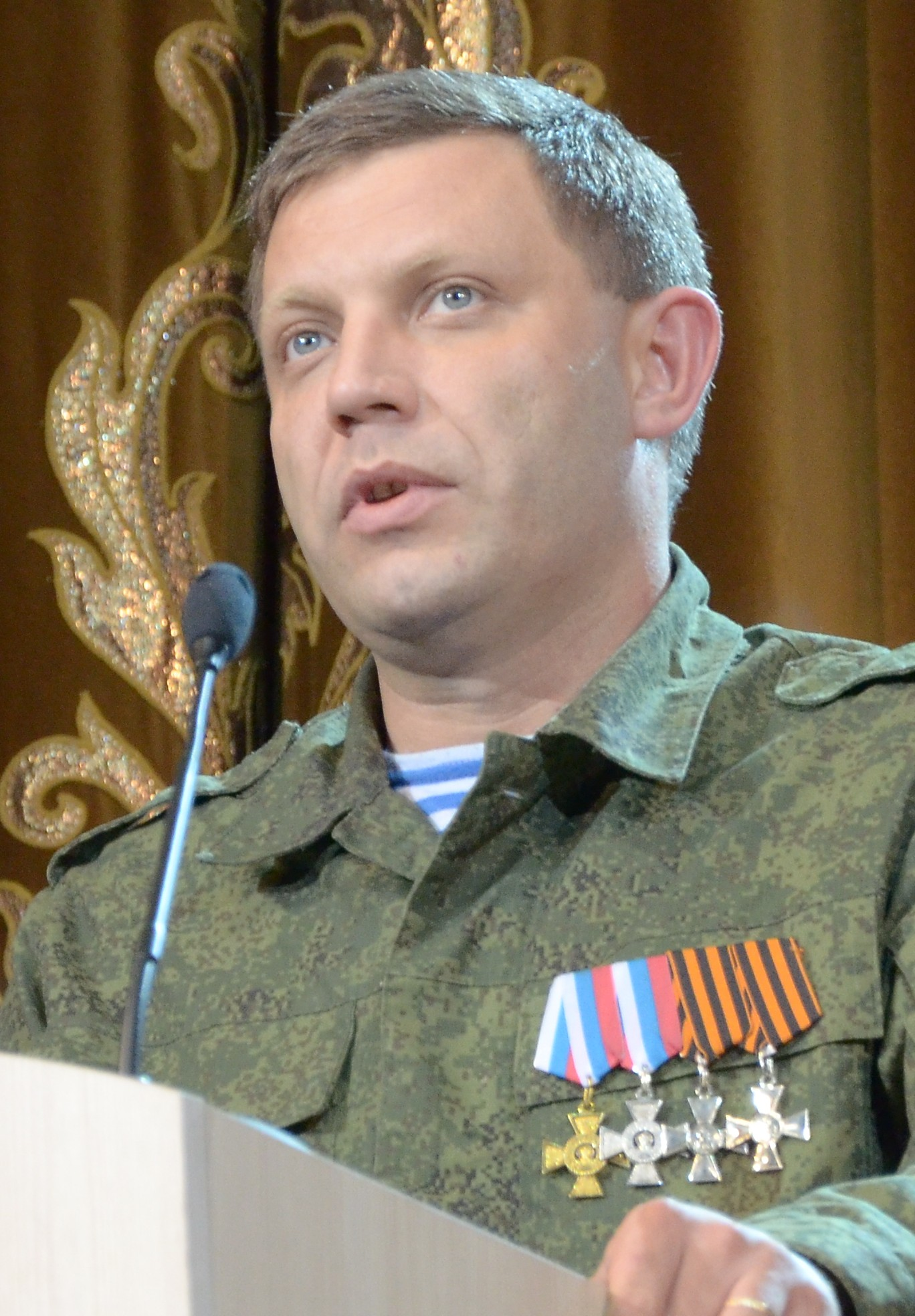 День спасателя в Донецке